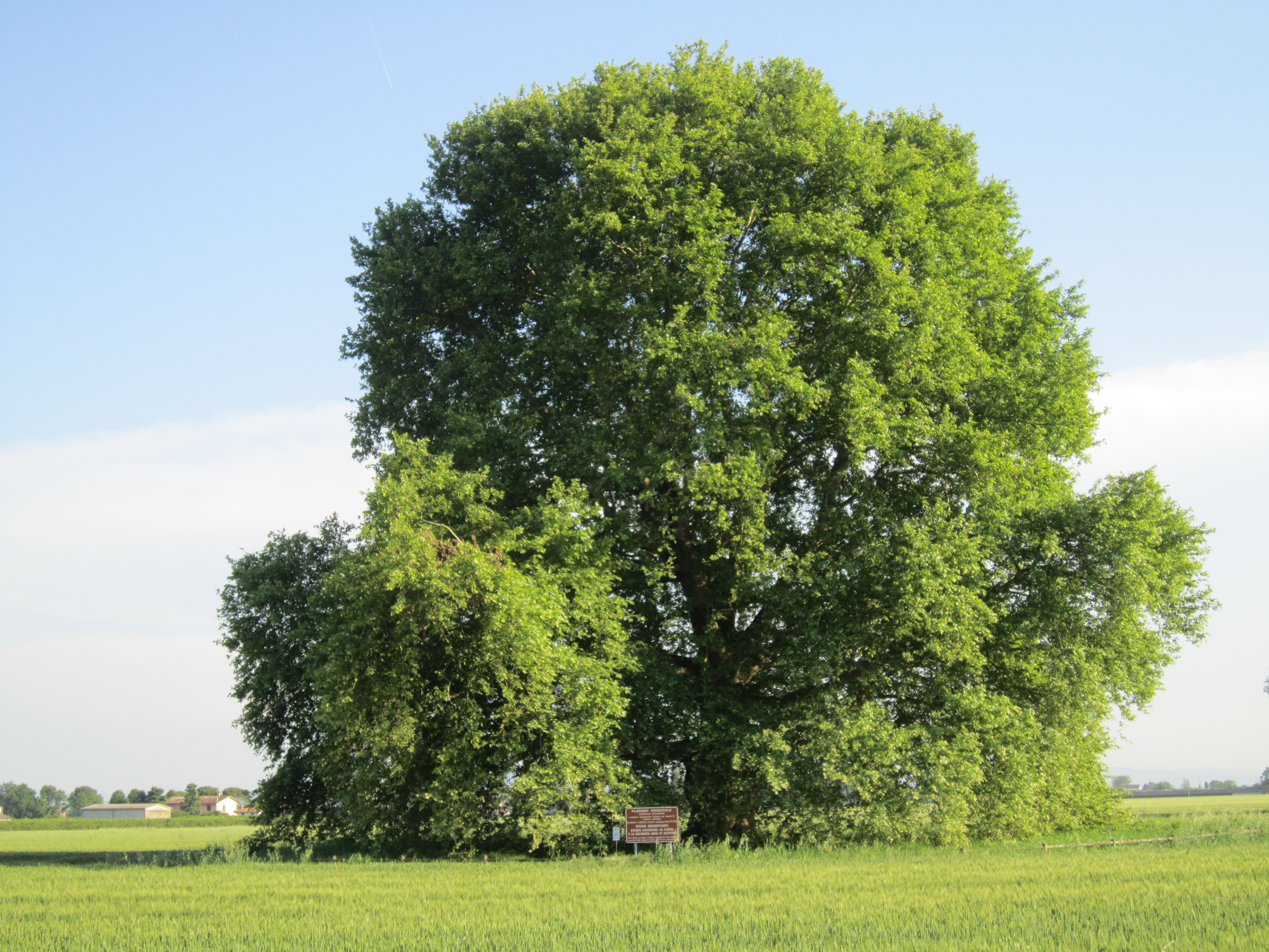 carpinello, frazione di Forlì: il platano secolare di Carpinello (Platanus orientalis).